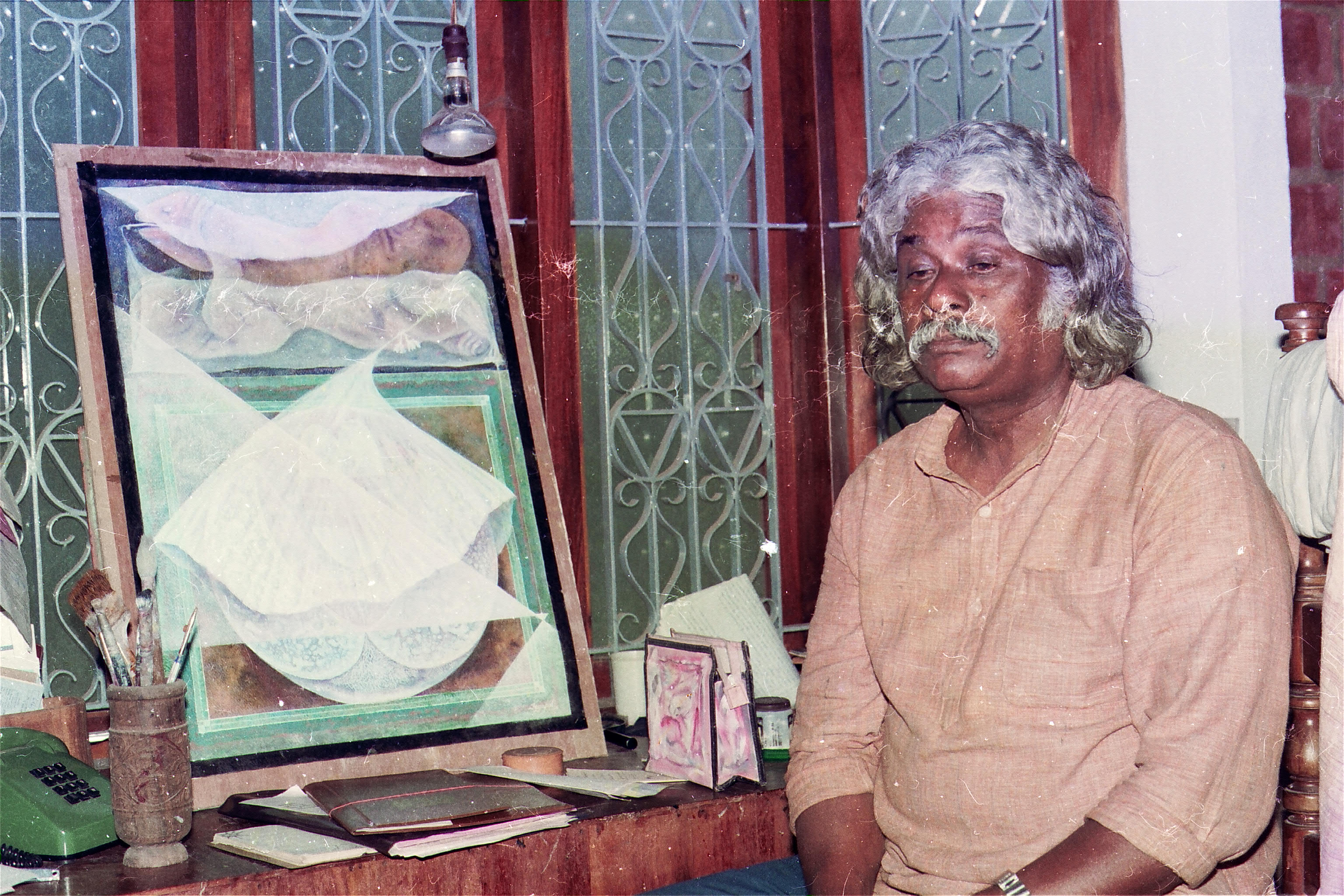 ജയപാലപ്പണിക്കർ